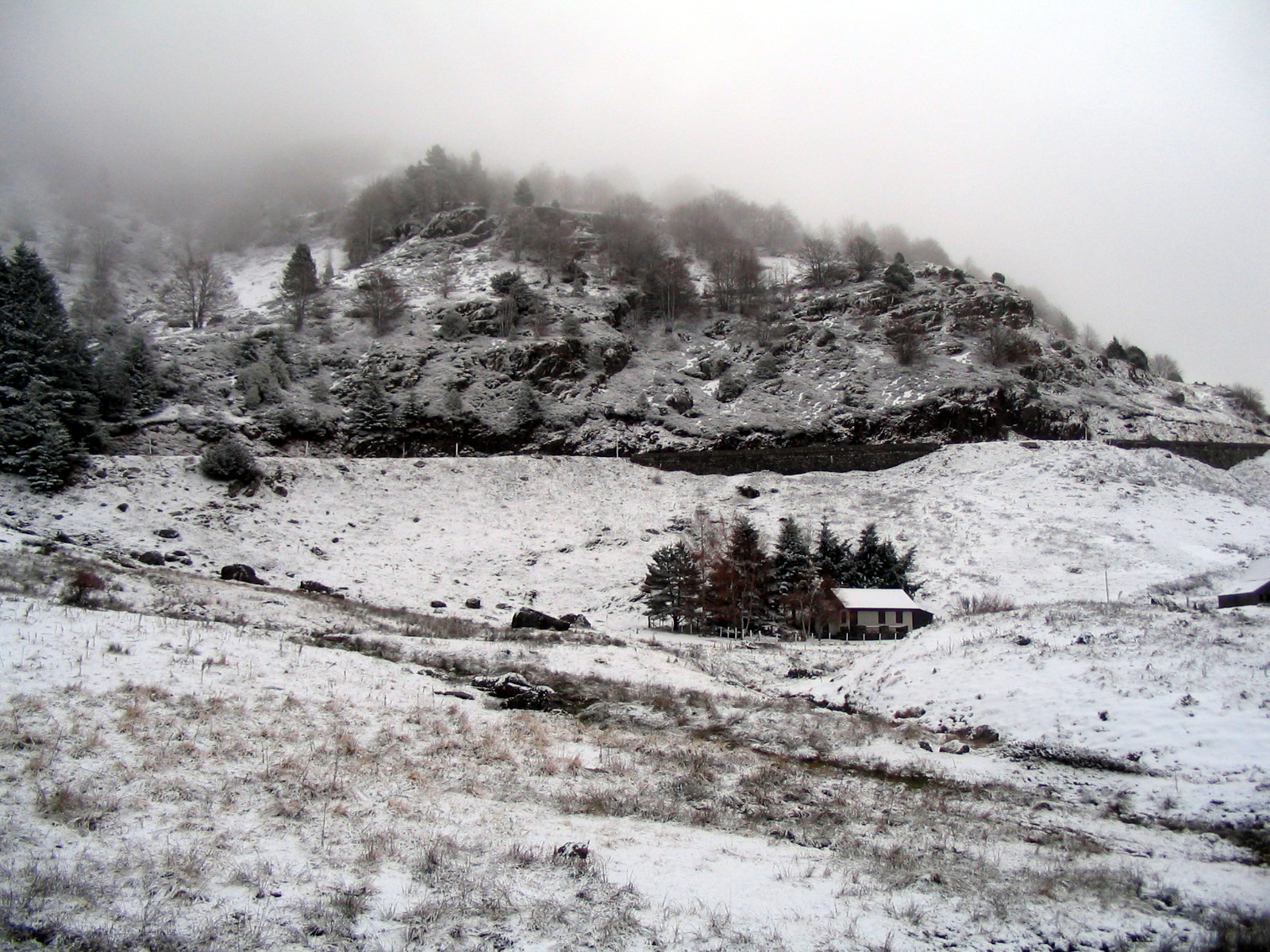 Première neige sur le col du Somport Pyrénées).